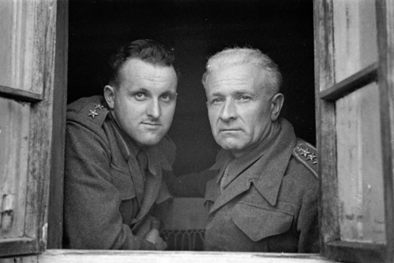 Чешские союзники полковник Людвиг Свобода (справа) и капитан Богумир Ломский